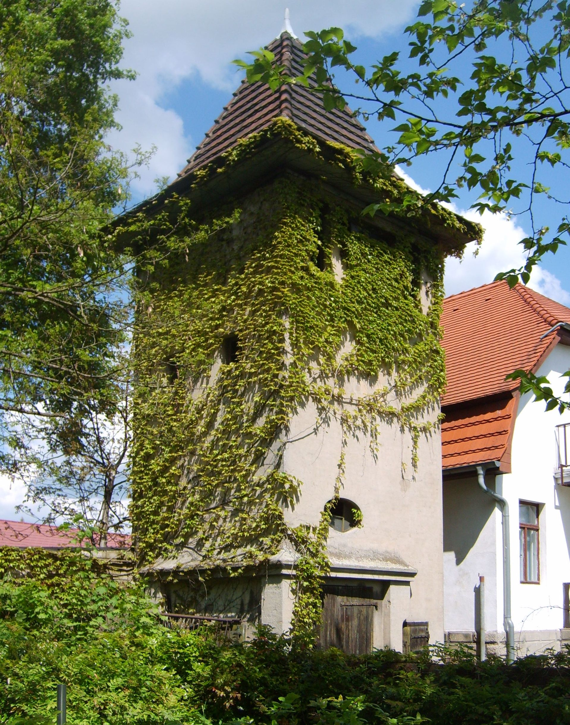 Transformatorenstation in Elsterwerda-Biehla